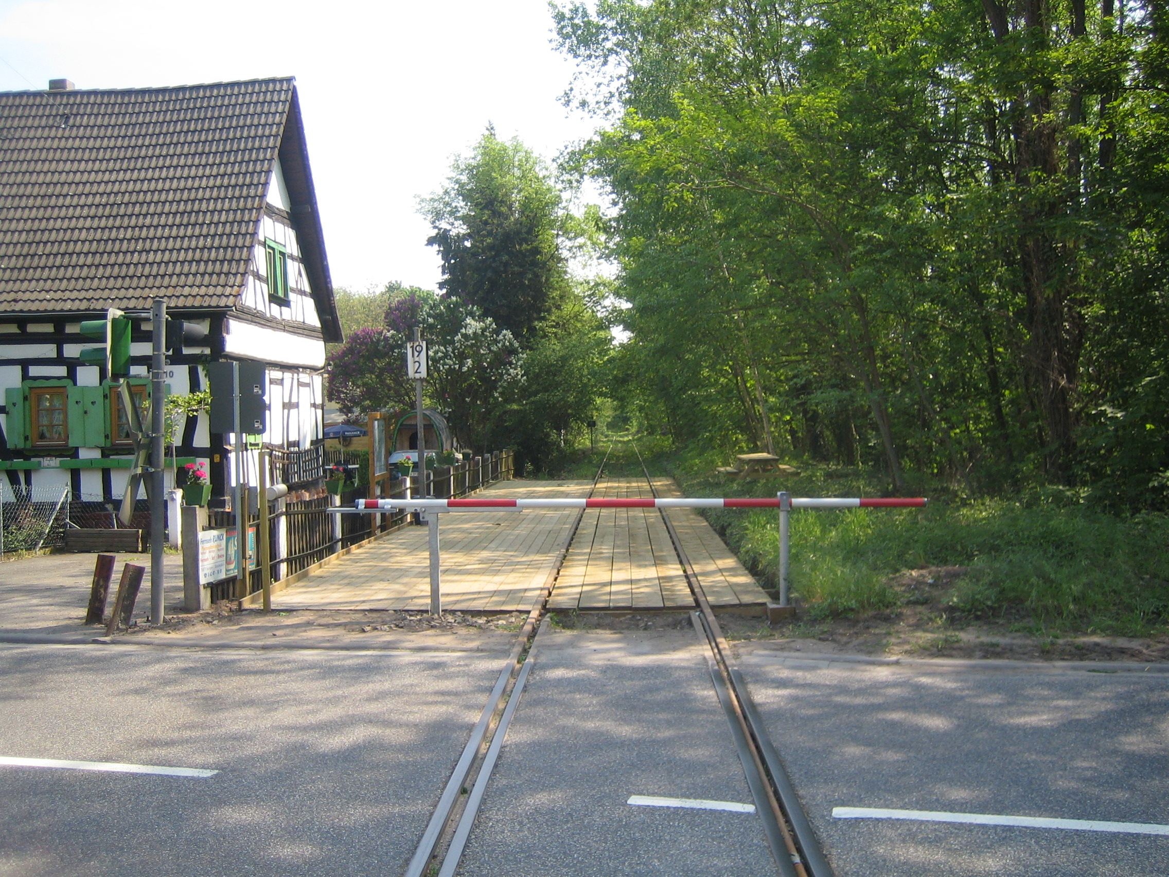 Ehemaliger Haltepunkt Dreihof an der Unteren Queichtalbahn